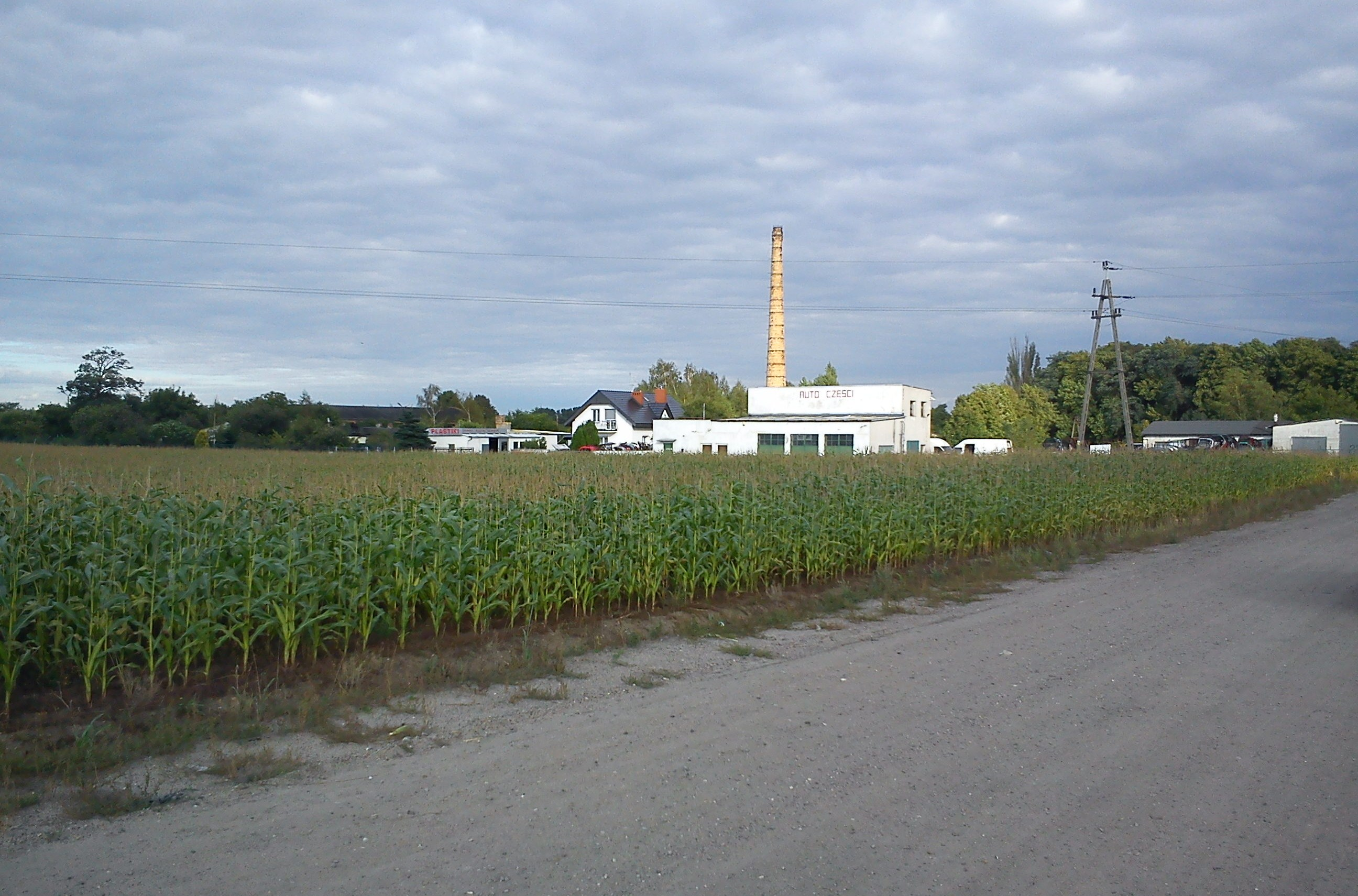 Tyniecka Street, Poznan (Kotowo District), old Brickwork (stara cegielnia)